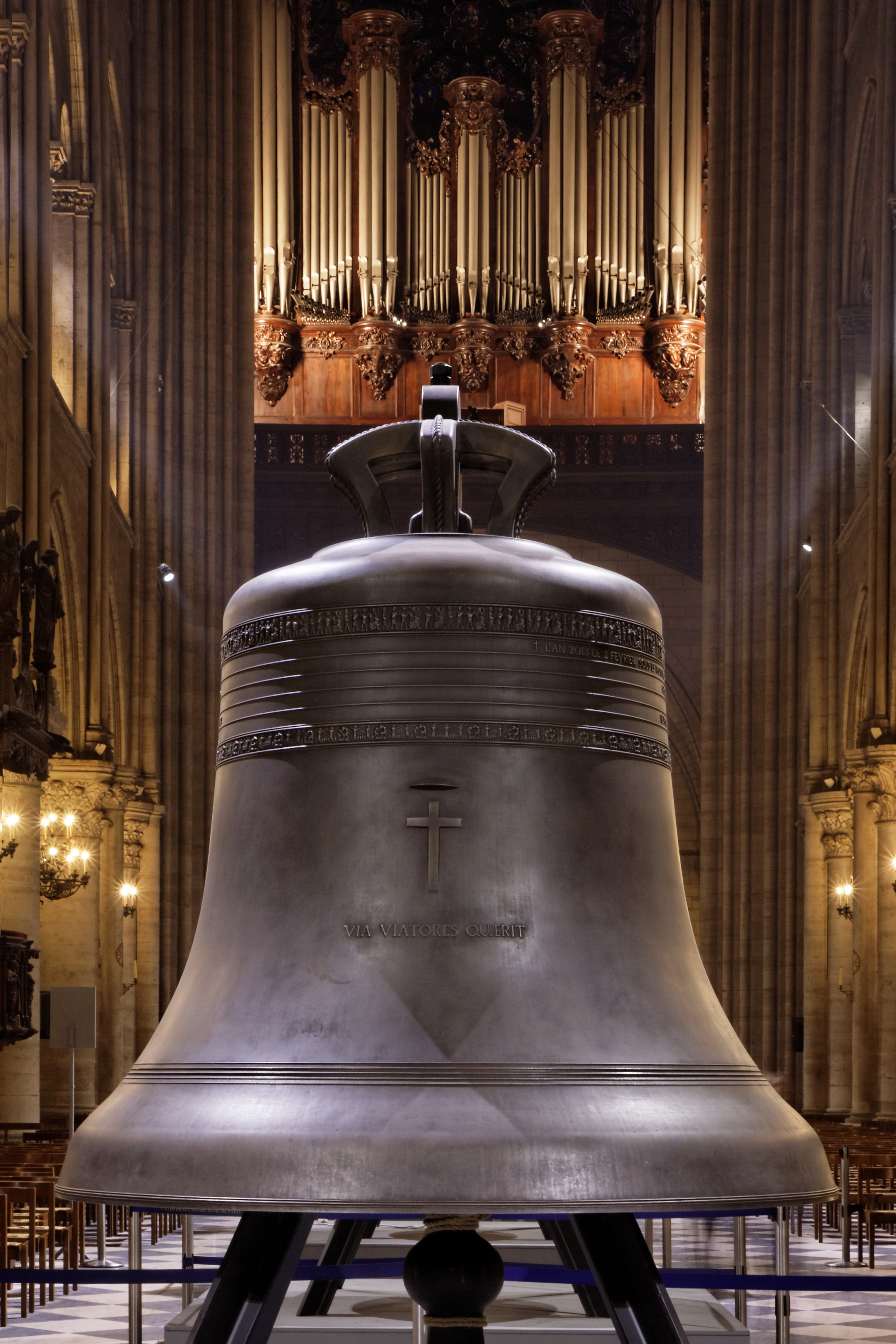 Les nouvelles cloches de la cathédrale Notre-Dame de Paris exposées au public dans la nef du 2 au 25 février 2013 avant leur installation dans les tours du monument.